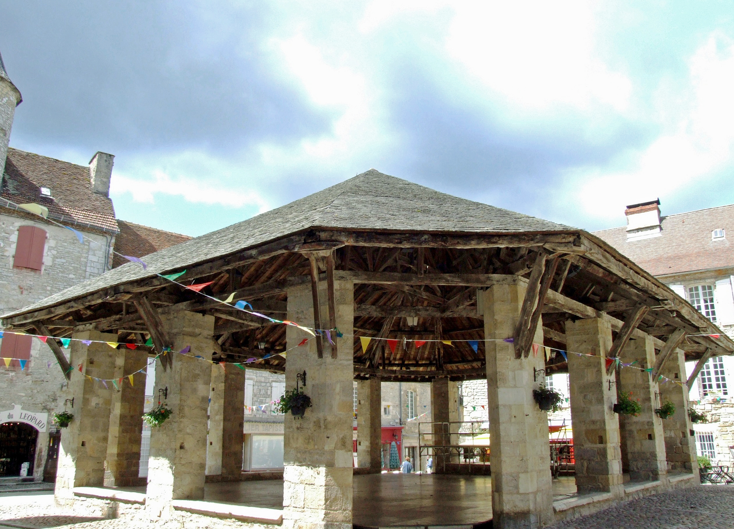 Martel - Halles